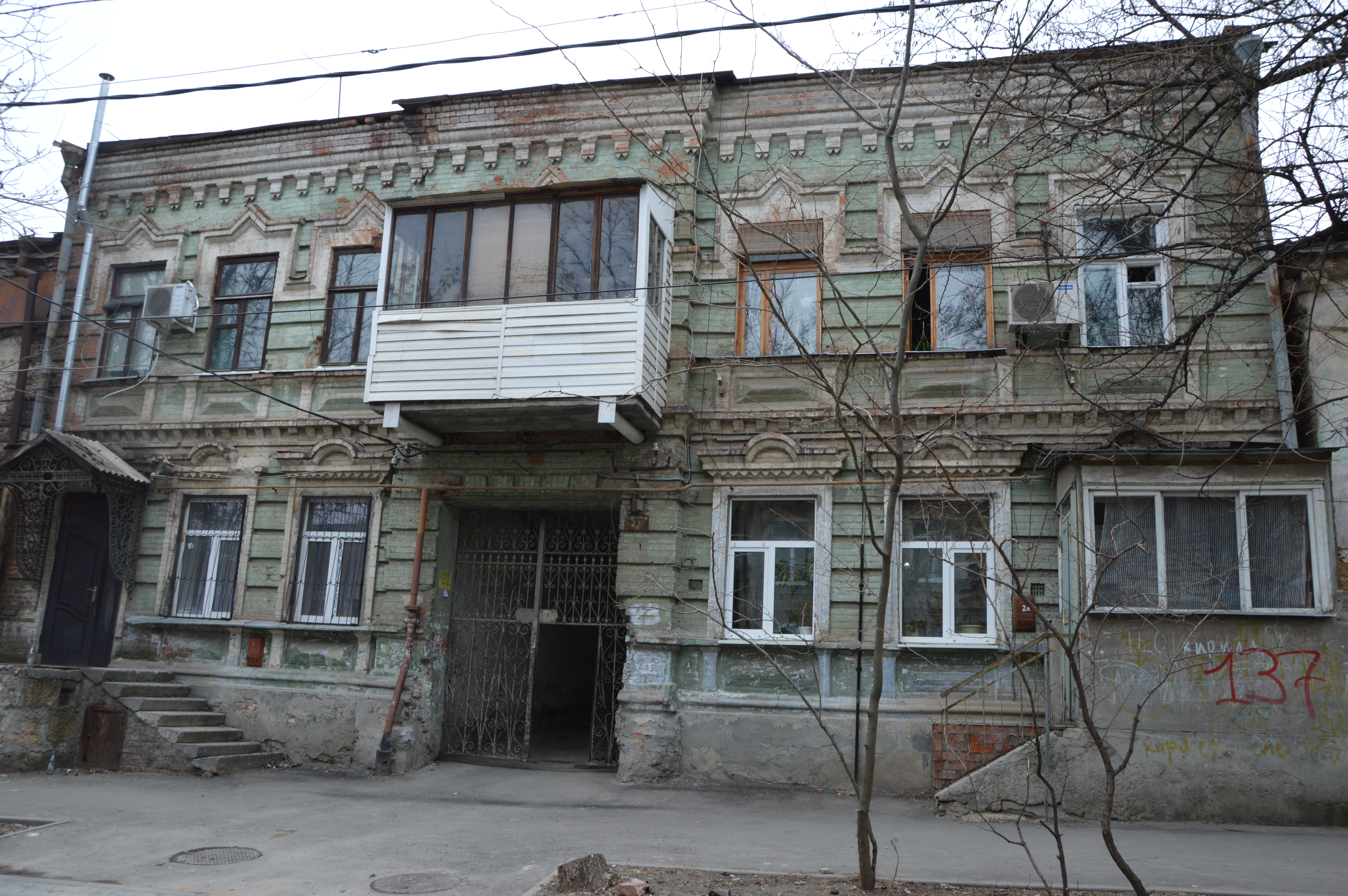 Здание города Ростова-на-Дону